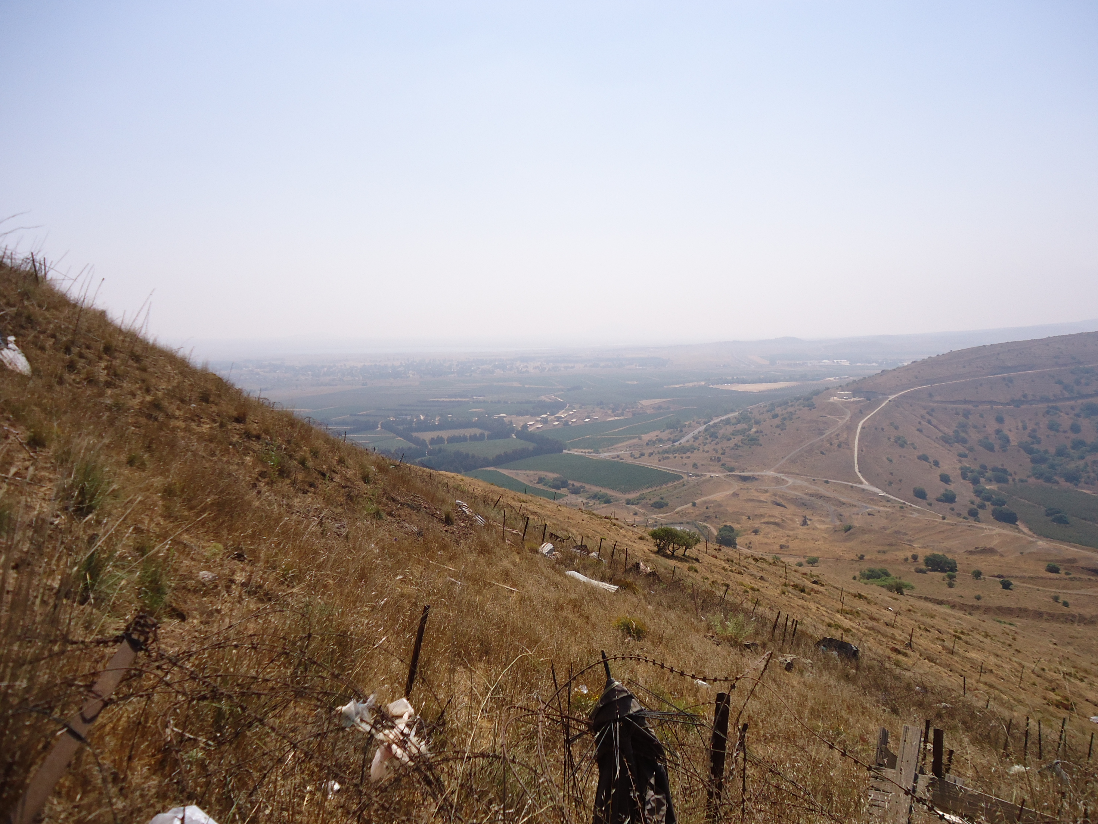 Lebanon/Syria/Israel Border